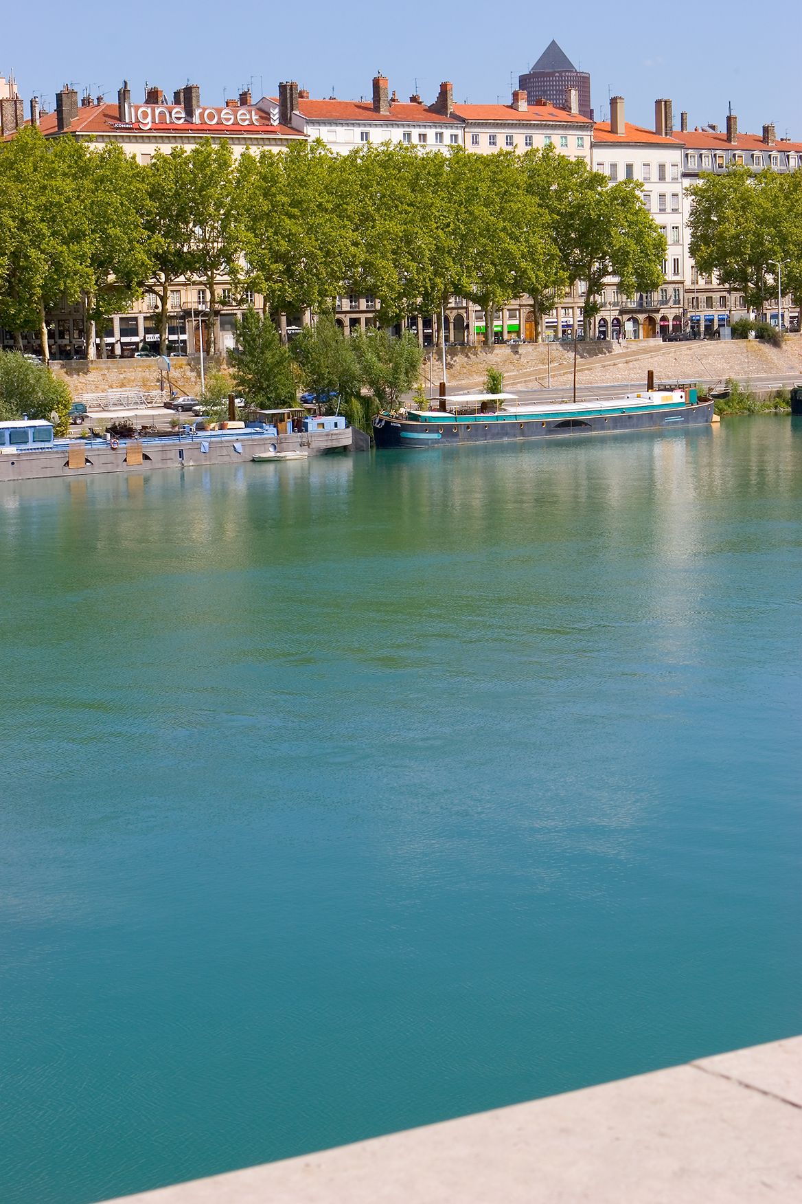 Rhône, Lyon, France.